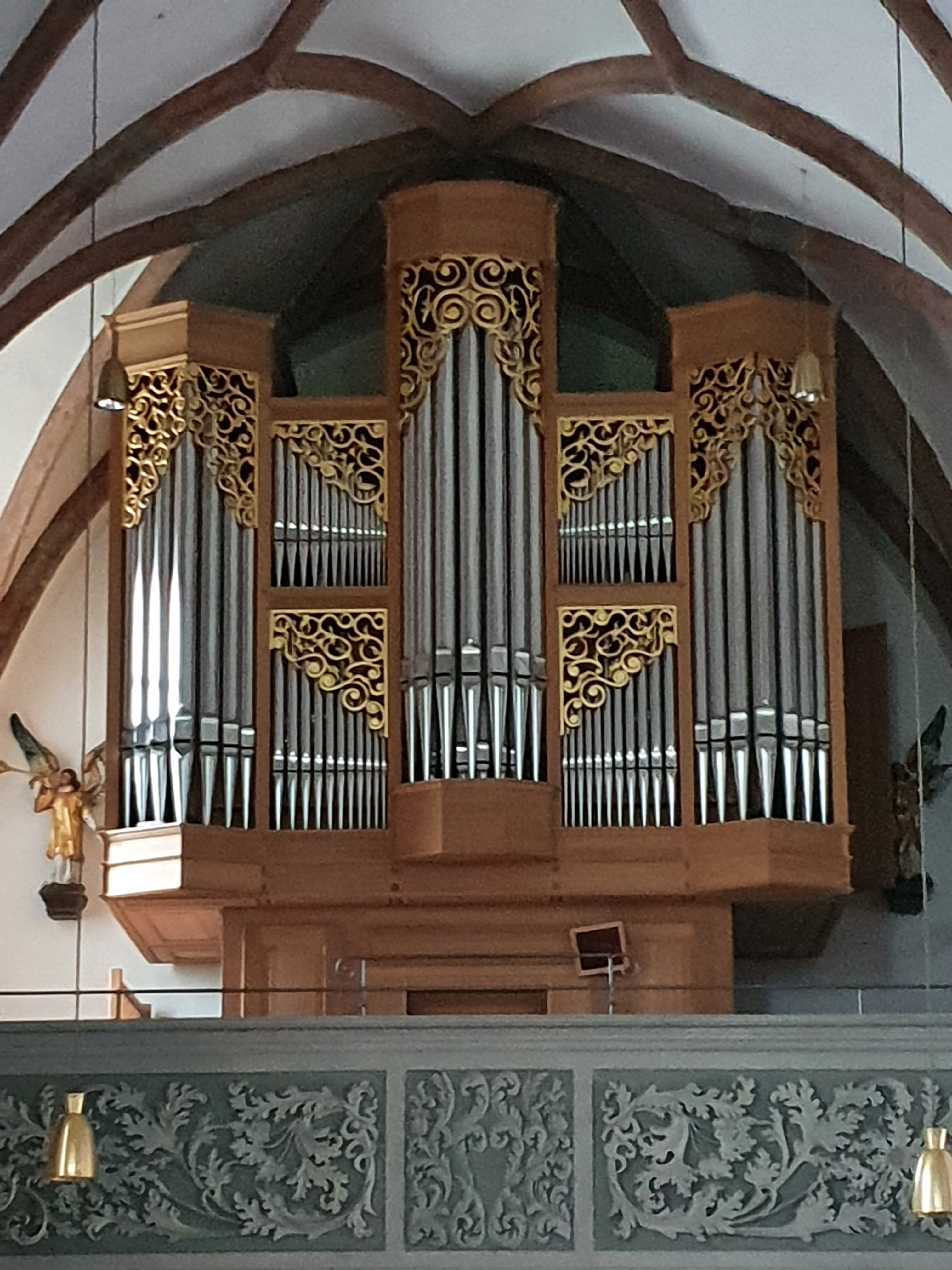 Karl Göckel-Orgel in Oberalm, 2008 fertiggestellt